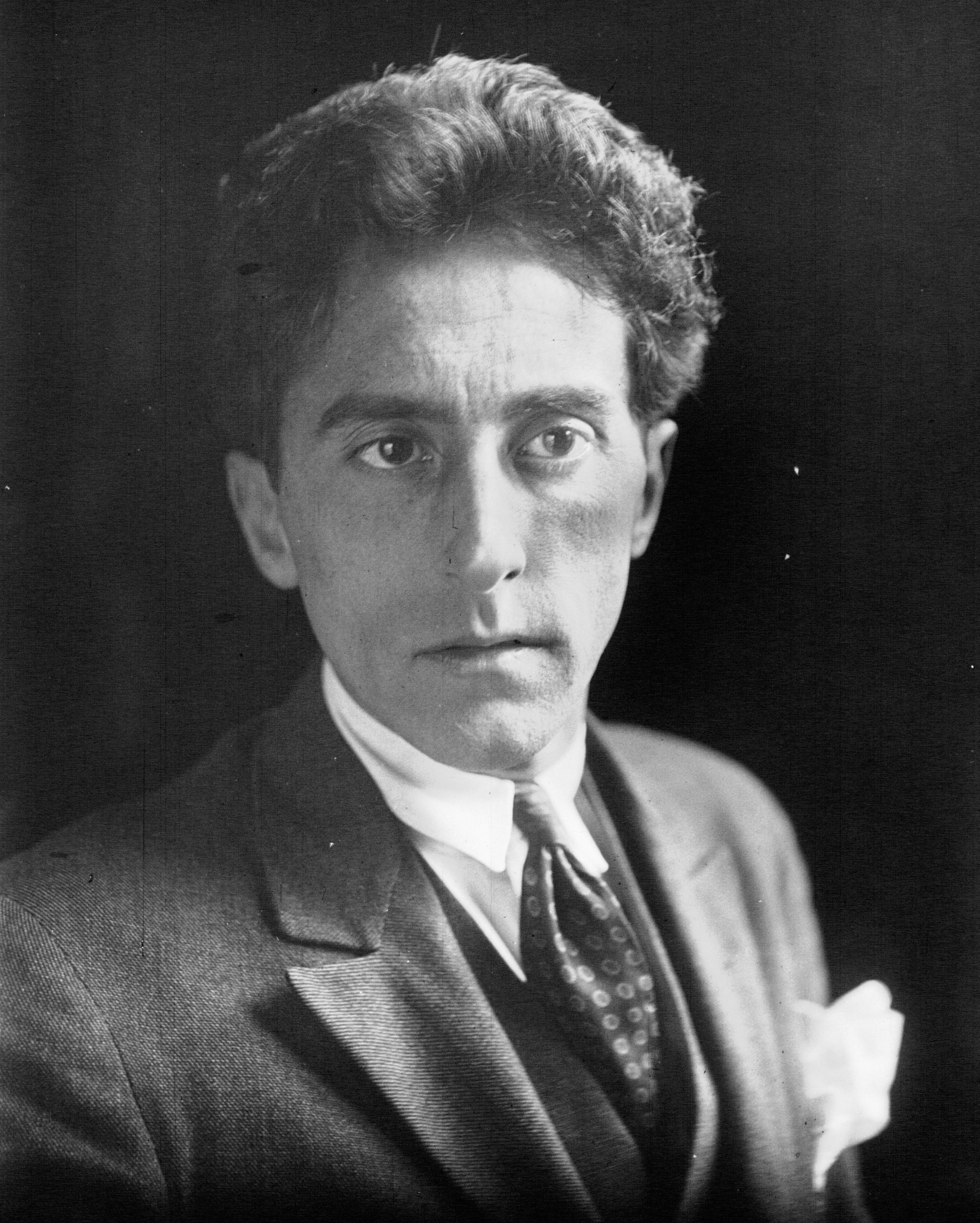 Portrait de "Jean Cocteau, homme de lettres".